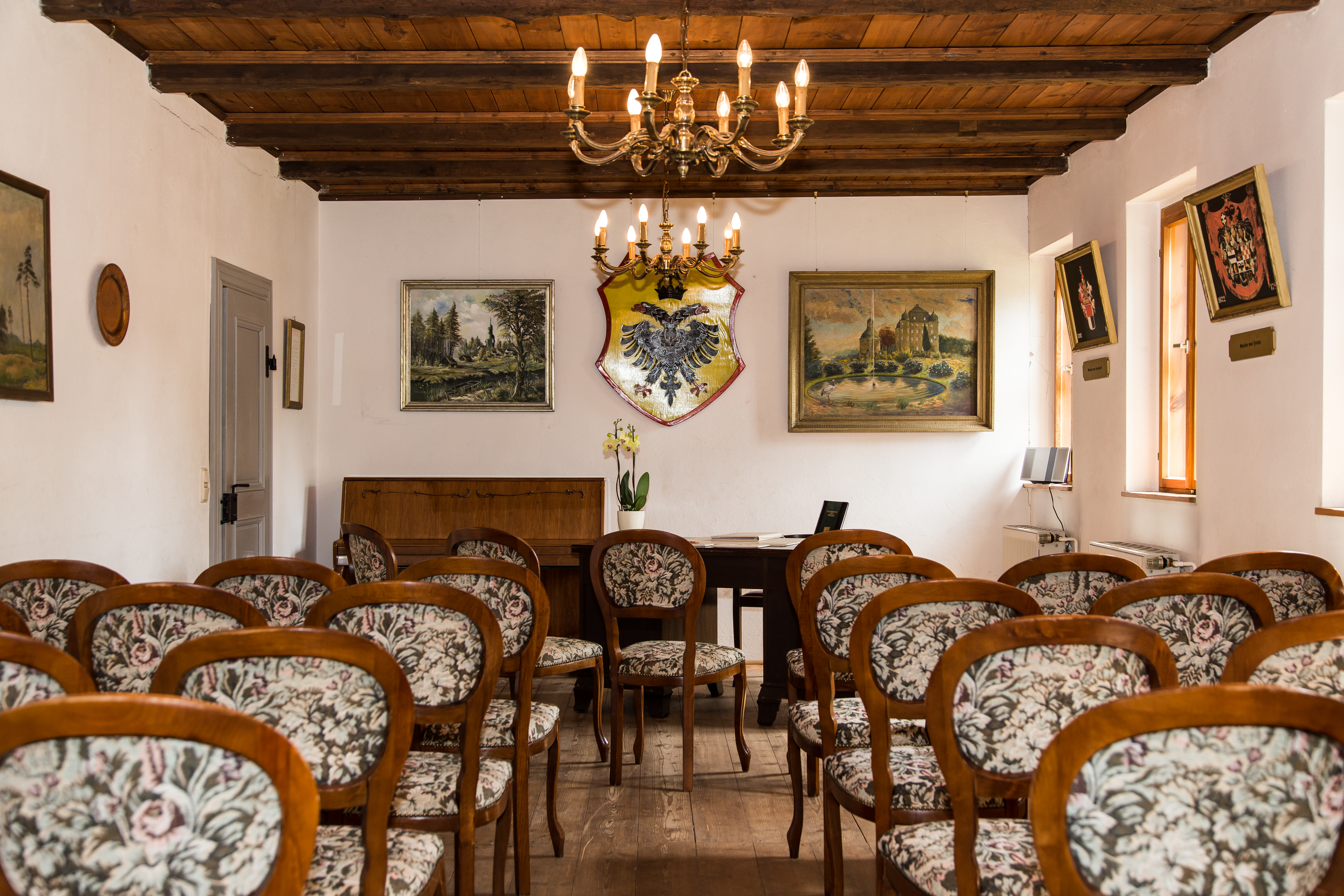 Trauzimmer im Gutshof in Ruhland; auch 'Festsaal' und 'Wappensaal' genannt